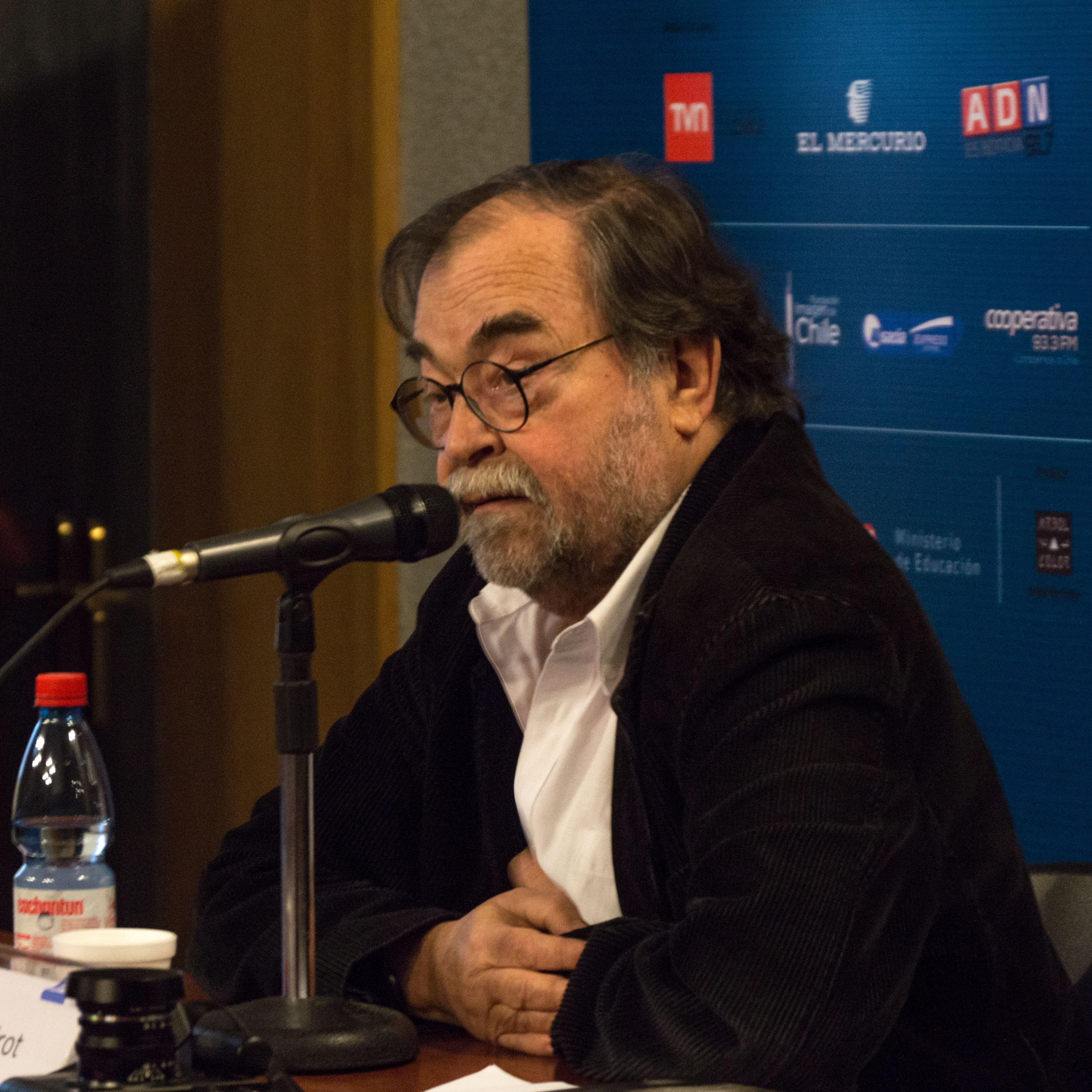 El fotógrafo chileno Luis Poirot en la Feria Internacional del Libro de Santiago 2013.